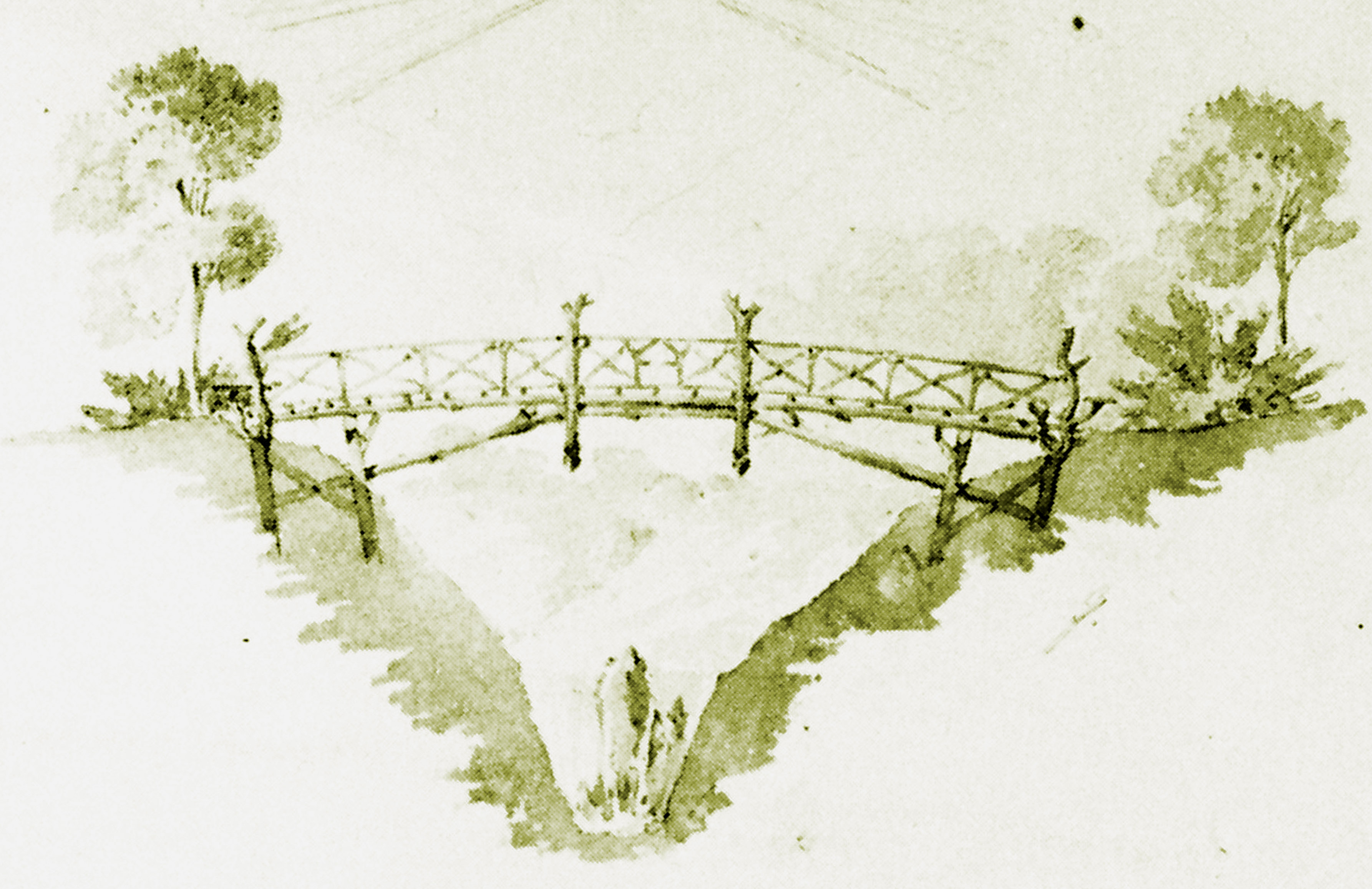 Ludwig Persius Entwurf Knüppelholzbrücke Spengwerk für Park Klein-Glienicke